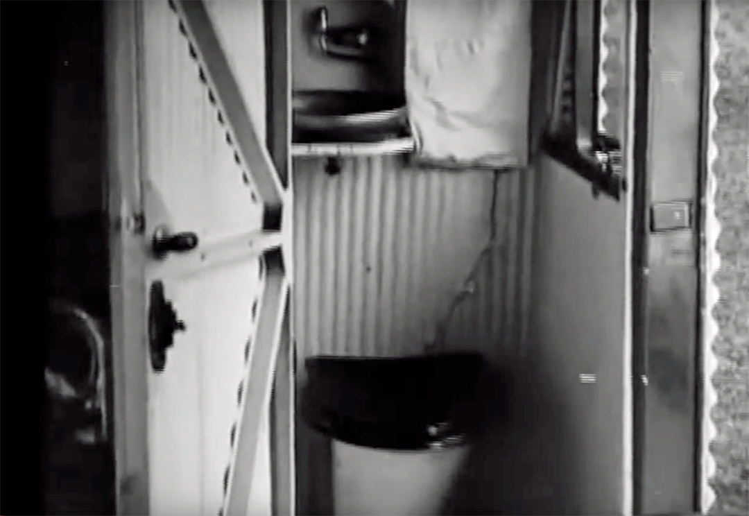 Junkers G 24 Bordtoilette (D-543) 1926